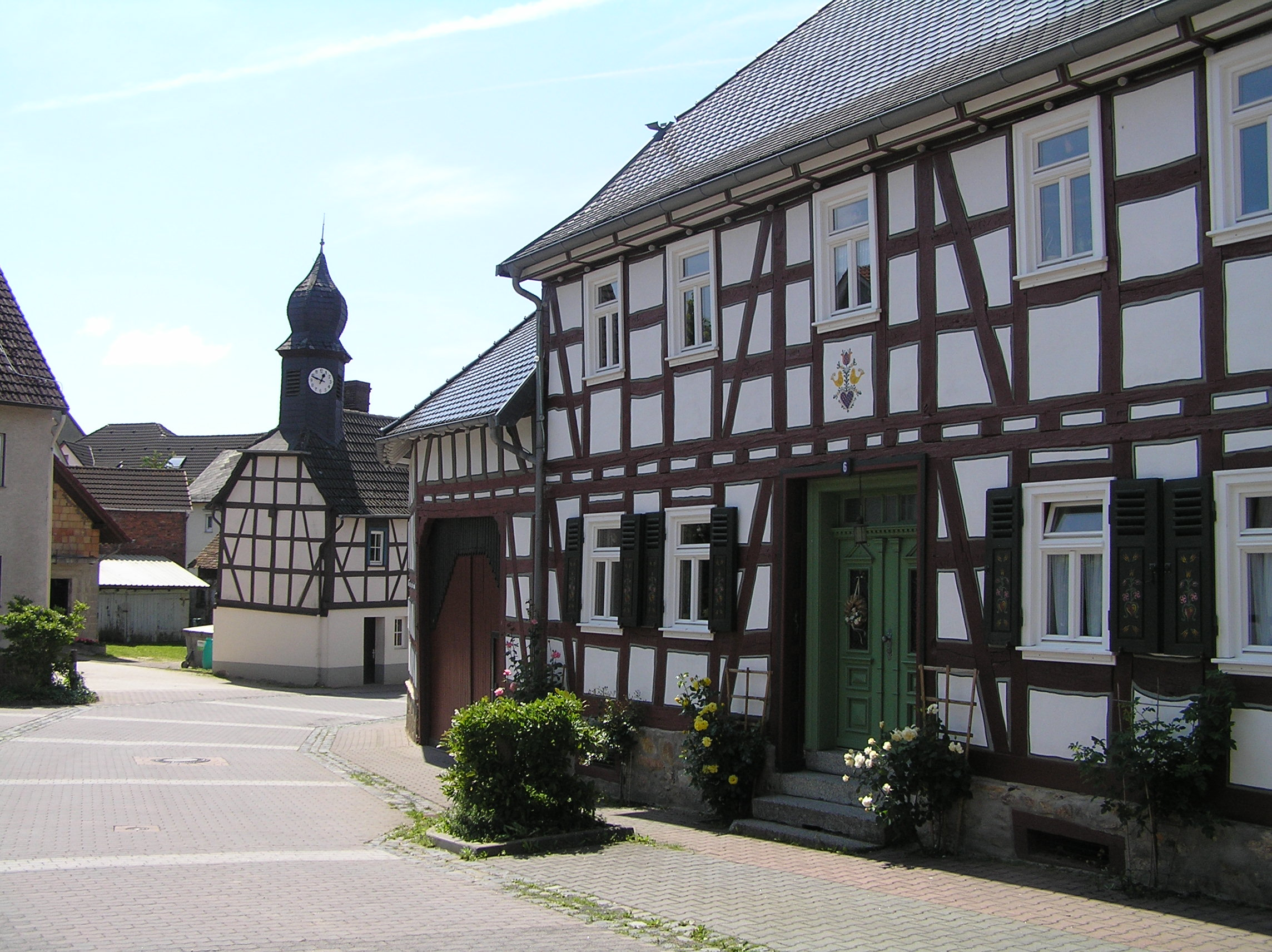 Kulturdenkmal Hofanlage Hauptstraße 6 in Oberseelbach. Das verputzte Wohnhaus mit Krüppelwalmdach aus der ersten Hälfte des 19. Jh. steht typologisch am Übergang vom barocken Bauernhaus zum biedermeierlichen Wohnhaustyp mit strenger Fassadenordnung und Mitteleingang.